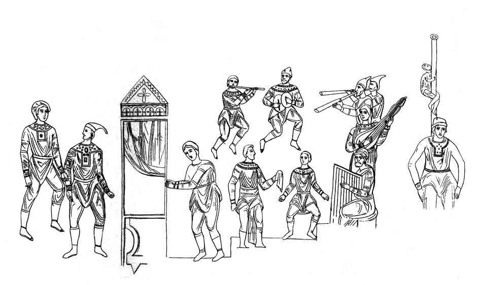 Музыканты и скоморохи. Фреска Софийского собора в Киеве. Прорись В.А. Прохорова. Начало 1870-х гг.